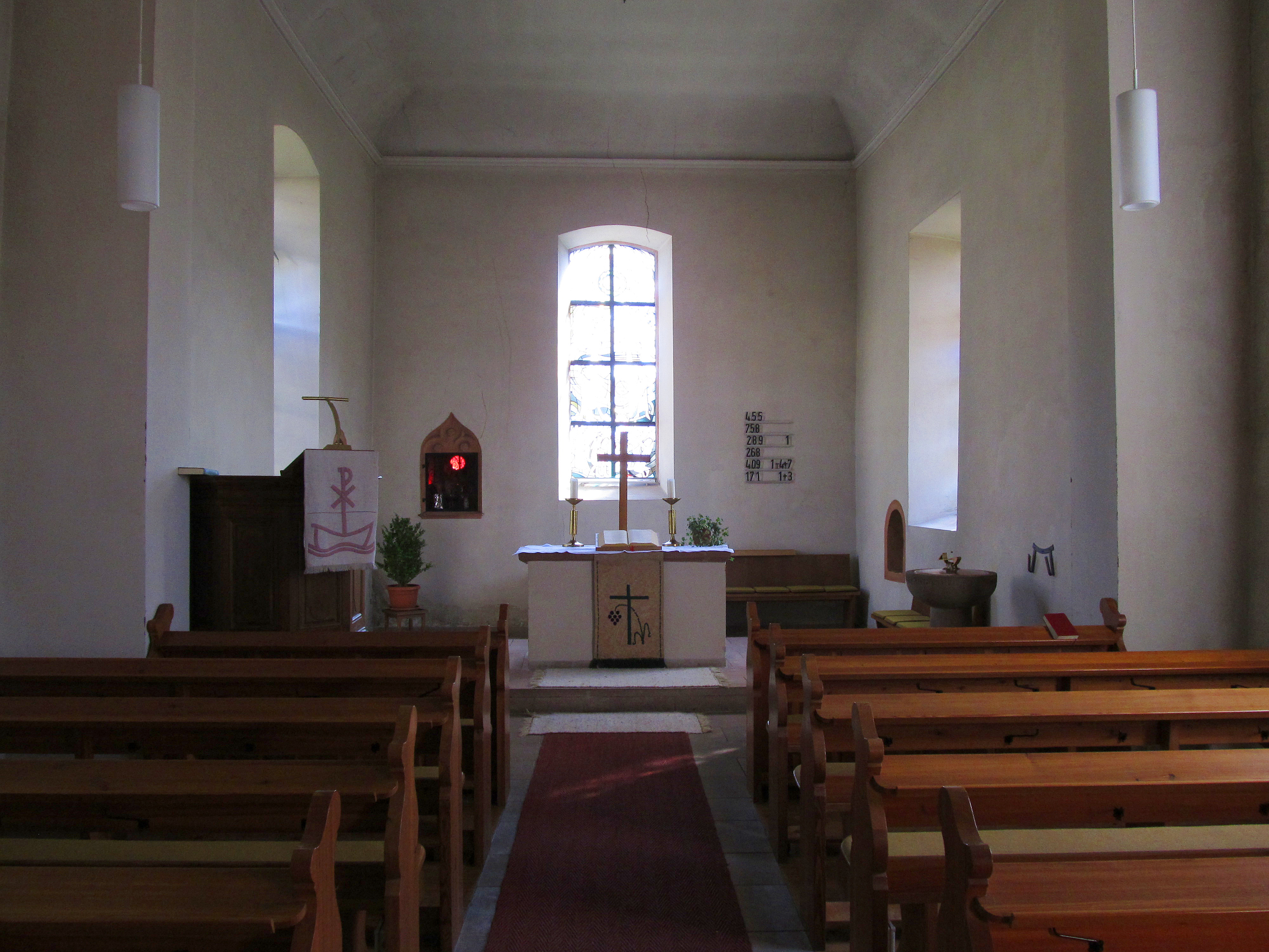 Blick ins Innere der protestantischen Kirche in Walsheim, einem Ortsteil der Gemeinde Gersheim, Saarland